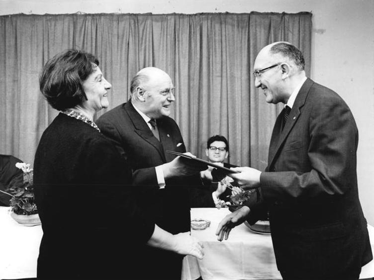 Zentralbild Kohls 15.12.1966 Berlin: Preisträger im Kinder- und Jugendbuch-Wettbewerb ausgezeichnet Im Berliner Club der Bühnen- und Filmschaffenden "Möwe" überreichte am 15.12.1966 der Leiter der Hauptabteilung Verlage und Buchhandel im Ministerium für Kultur, Bruno Haid Urkunden und Auszeichnungen an die Preisträger im Kinder- und Jugendbuch-Wettbewerb. Hier erhalten Ferdinand und Käte May (links) einen Preis für ihren Maratroman "Der Freund der Sansculotten.